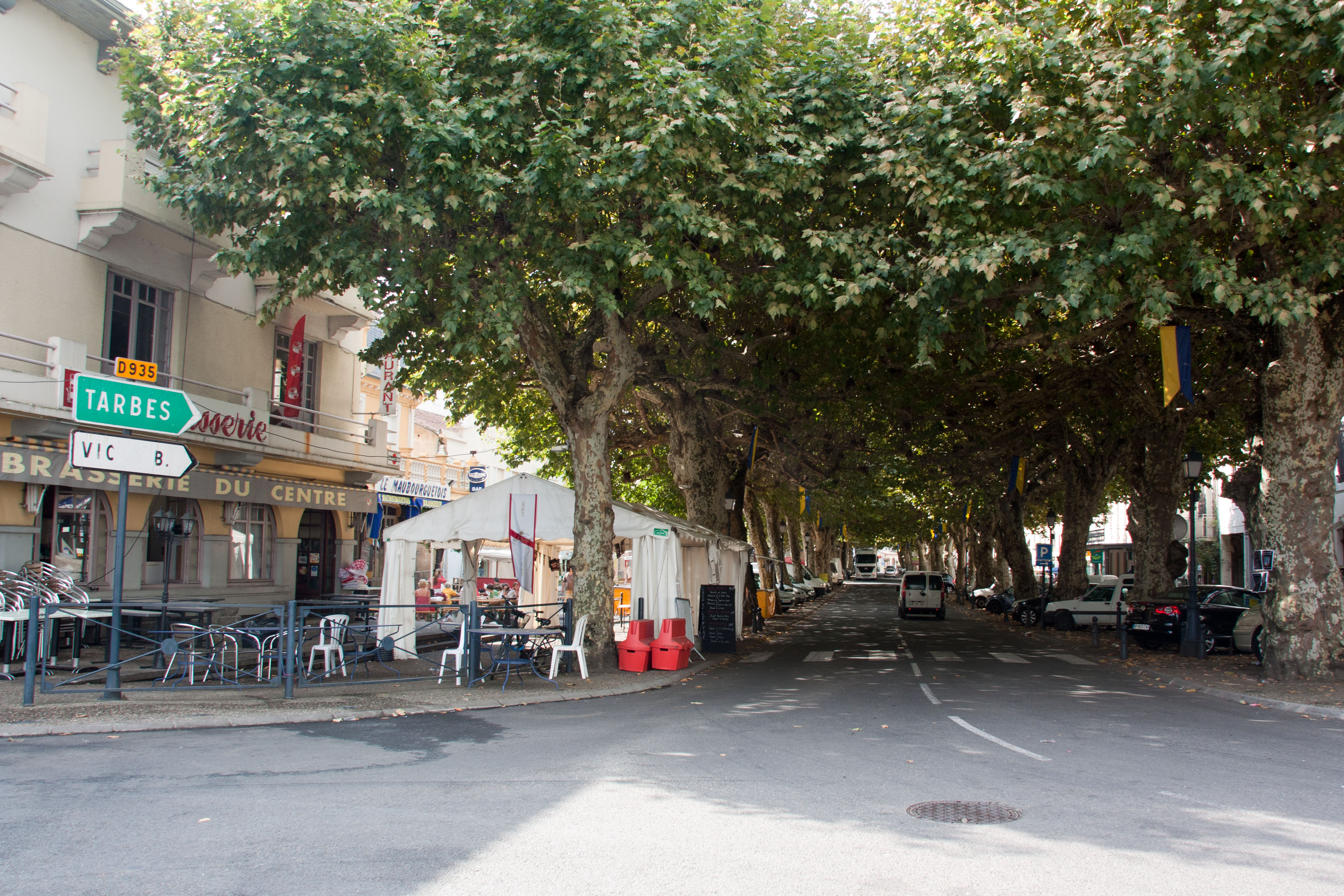 Les allées Larbanes, Maubourguet, Hautes-Pyrénées, France